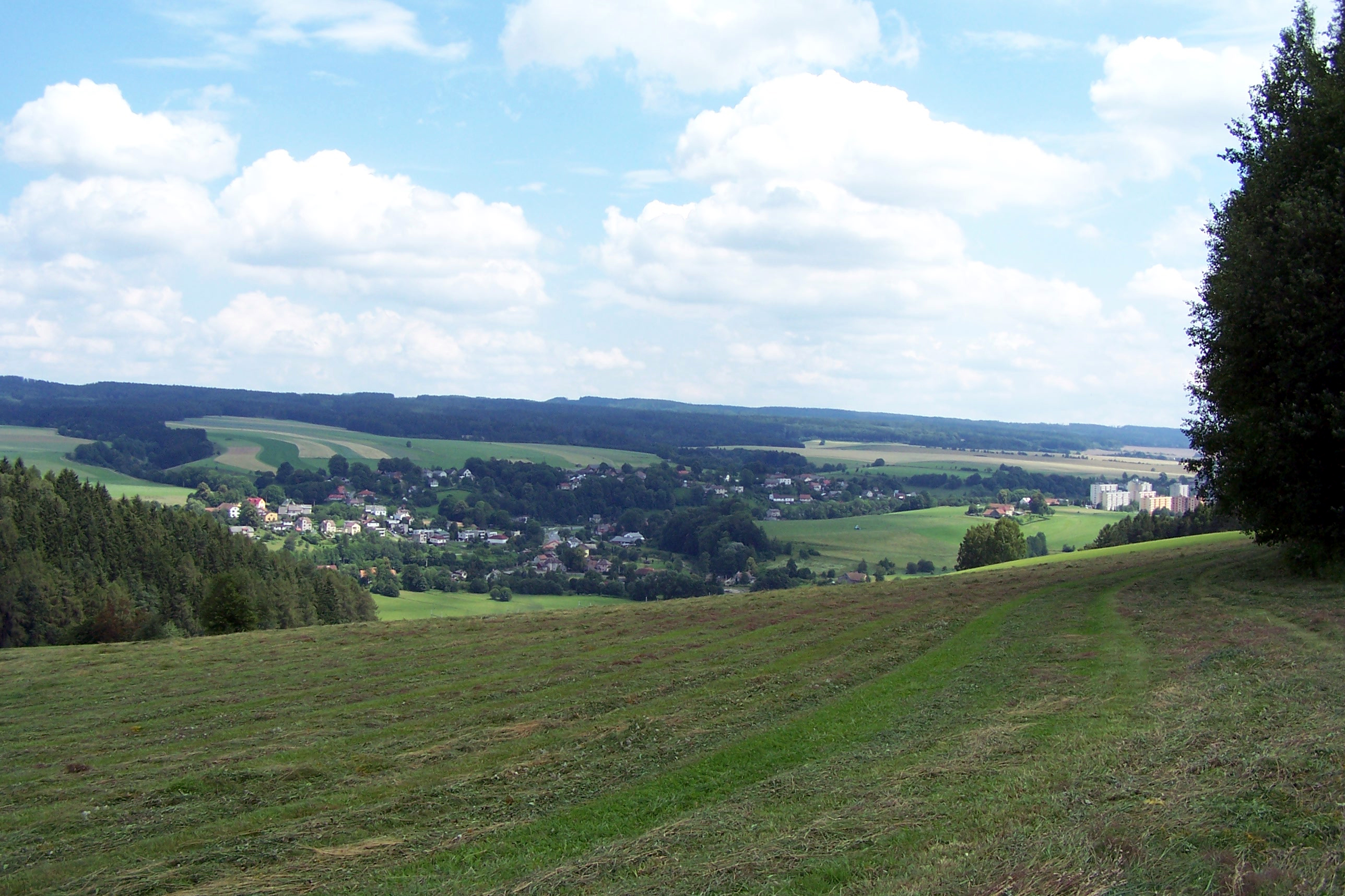 Lhotka, která je součástí České Třebové